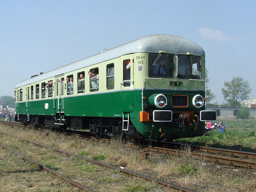 Wagon motorowy SN61-183.